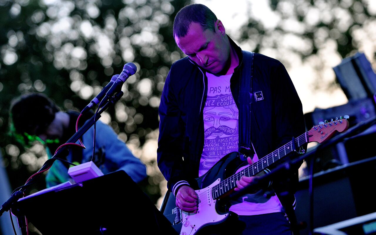 Fon Román en concierto